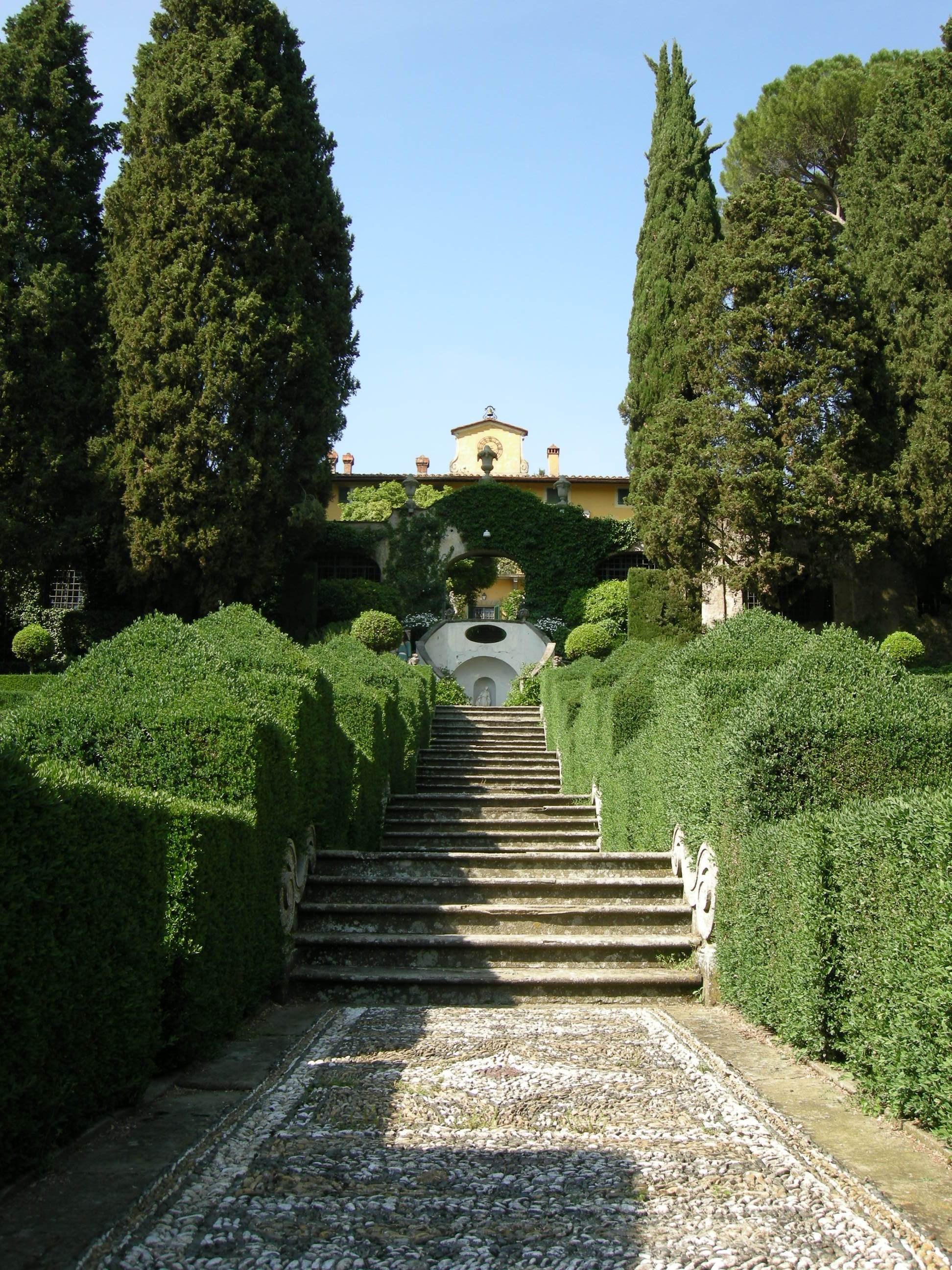 Villa i tatti, giardino all'italiana, scala